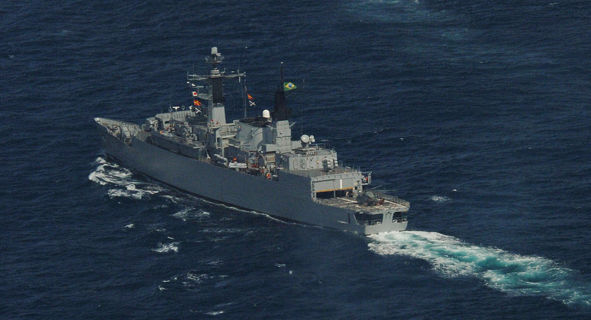 Die brasilianische Fregatte BNS Rademaker (F 49) während einer Übung nahe der Küste Brasiliens. The Brazilian frigate BNS Rademaker (F 49), steam in formation off the coast of Brazil. Naval forces from Argentina, Brazil, Spain, Uruguay and the United States are participating in UNITAS 47-06 Atlantic phase. This is a U.S. Southern Command-sponsored exercise that enhances friendly, mutual cooperation and understanding between participating navies by enhancing interoperability in naval operations among the nations of the Western Hemisphere. Sonstiges: Bildausschnitt